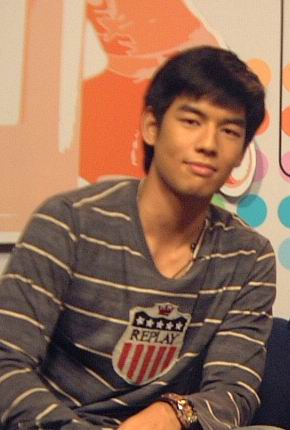 Watcharabul Leesuwan (วัชรบูล ลี้สุวรรณ)